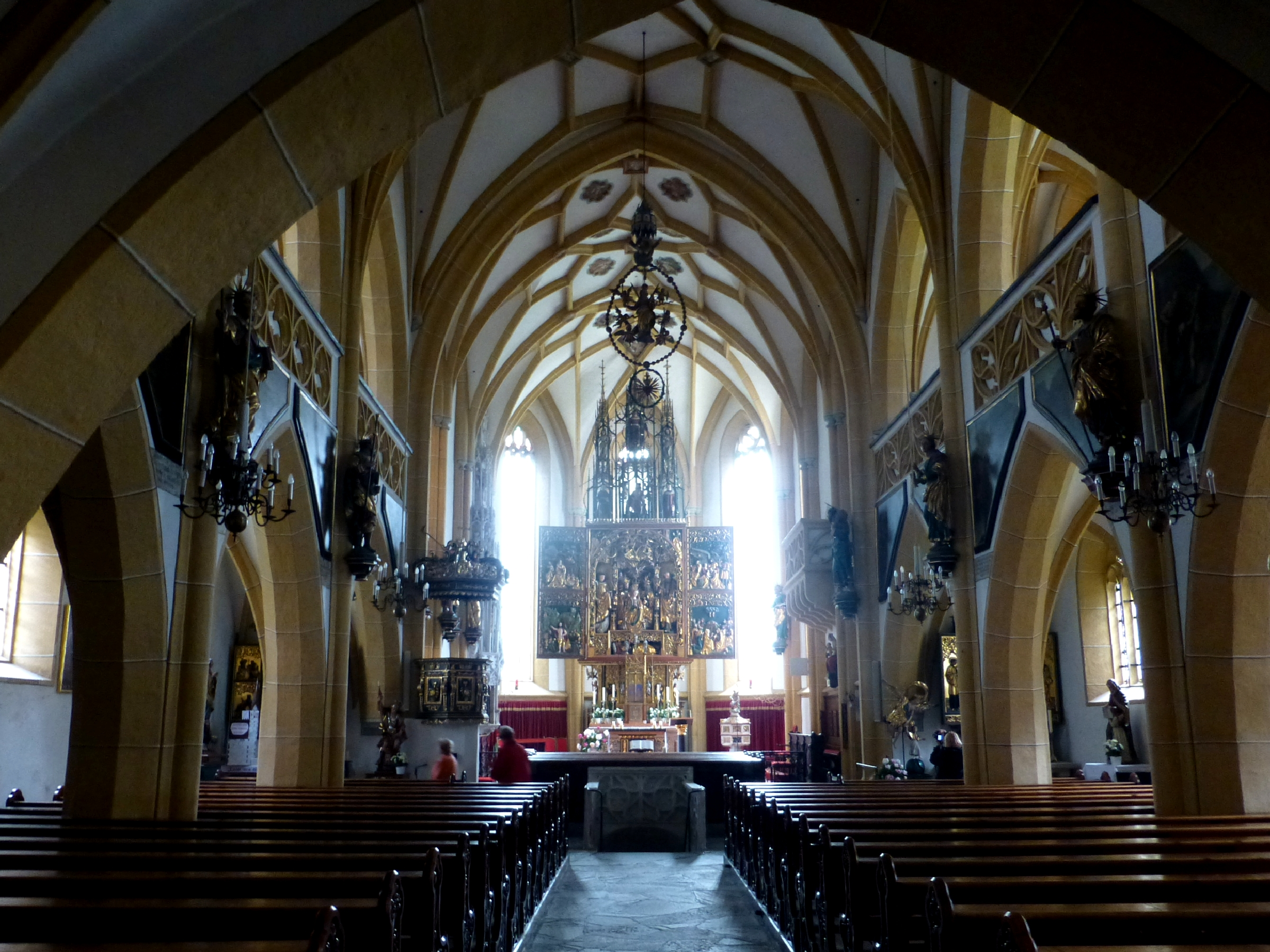 Saint Vinzenz Pfarrkirche Heiligenblut Austria